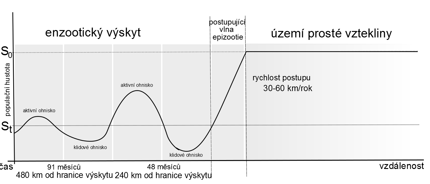 na podkladě grafu z práce Murray et al 1989: vztah mezi hustotou populace vnímavého hostitele a postupující vlnou vzteklinové epizootie S0 = populační hustota bez vlivu vztekliny St = nejnižší hustota populace hostitele, při které se vzteklina dokáže šířit z jednoho zvířete na druhé